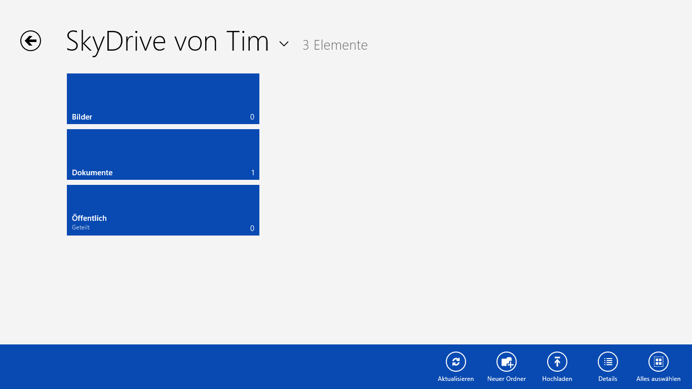 Die App SkyDrive aus Windows 8